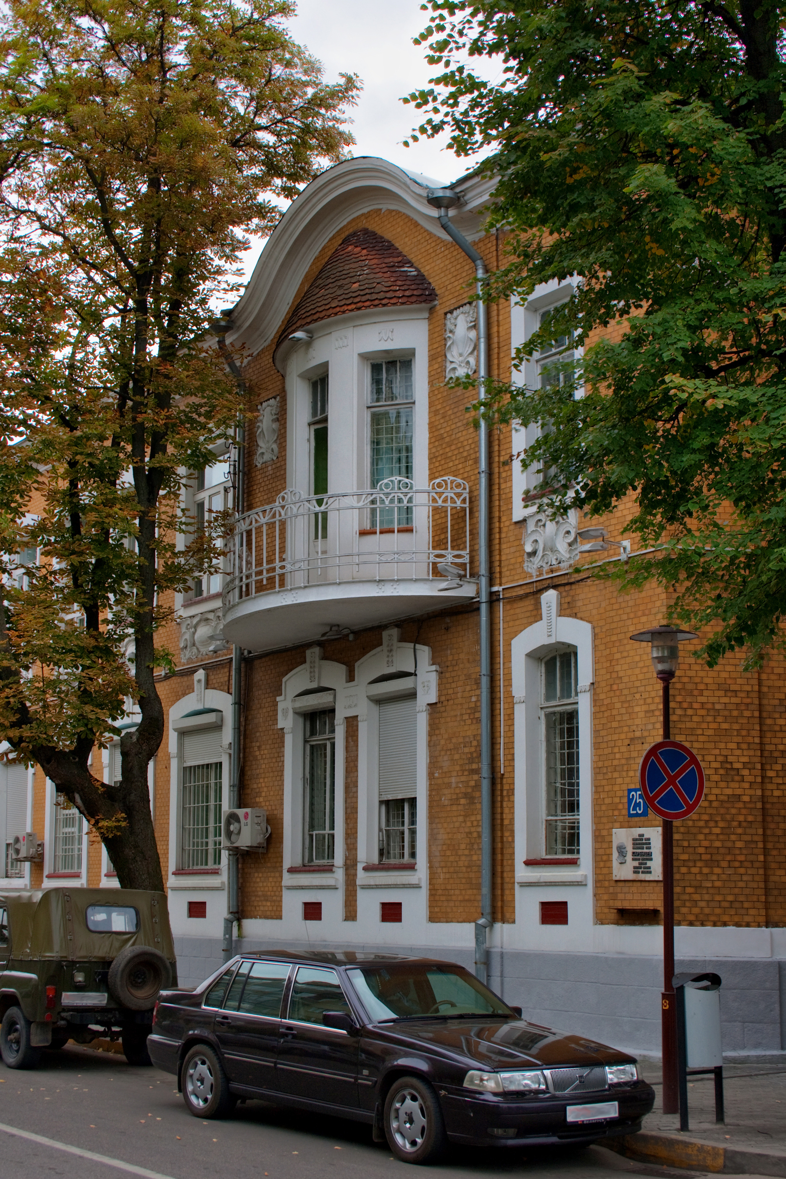 Беларуская (тарашкевіца): Будынак былога пазямельнага банка(архітэктар Б.П. Астравумаў). г. Горадня This is a photo of Belarusian heritage monument. Reference number: 412Г000656 ( WLM)